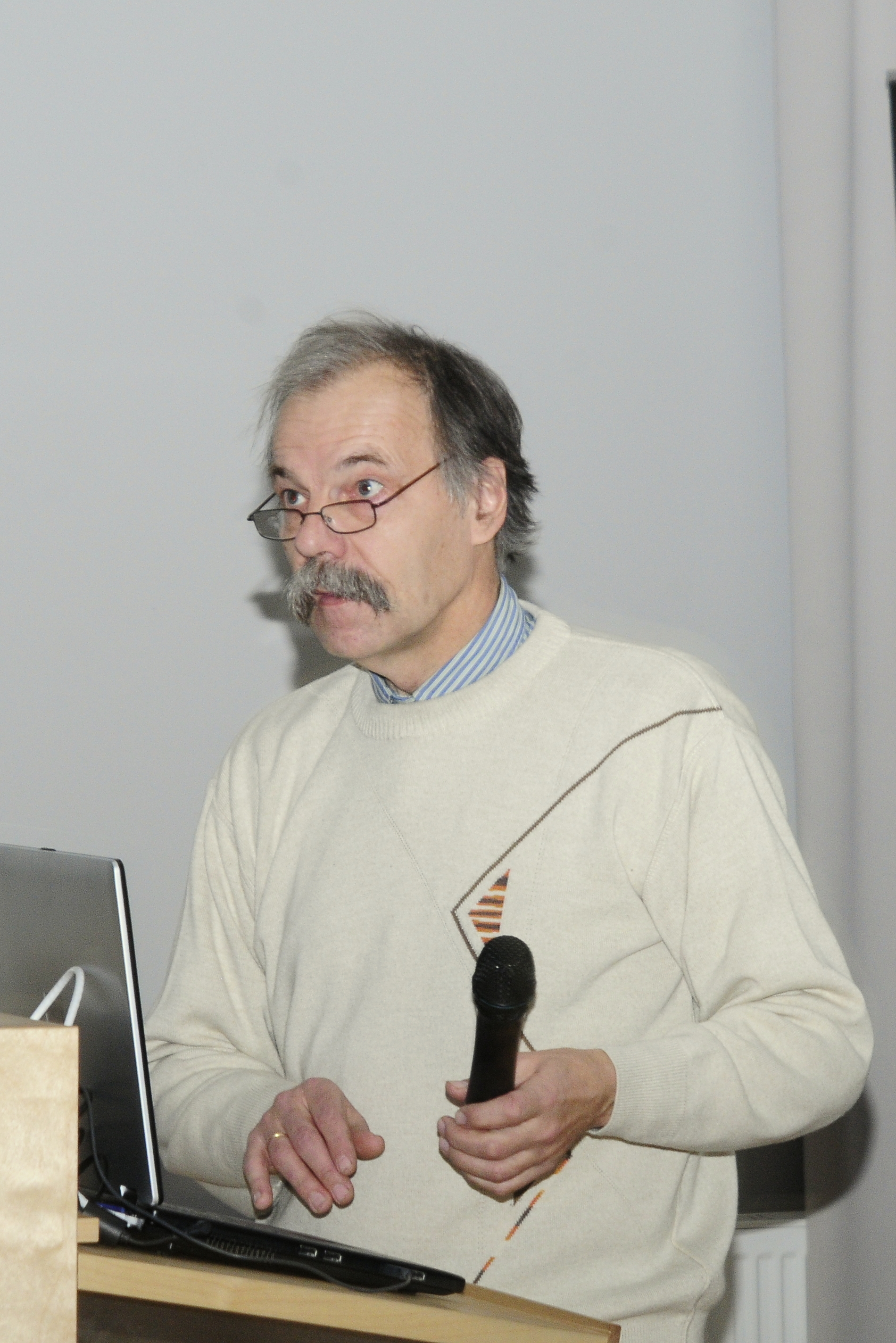 Tõnu Pani tegemas ettekannet Teadusfoto 2012 lõpuüritusel.